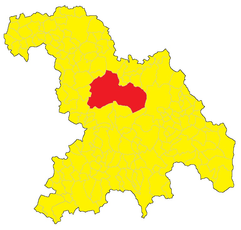 Mappa di Alessandria